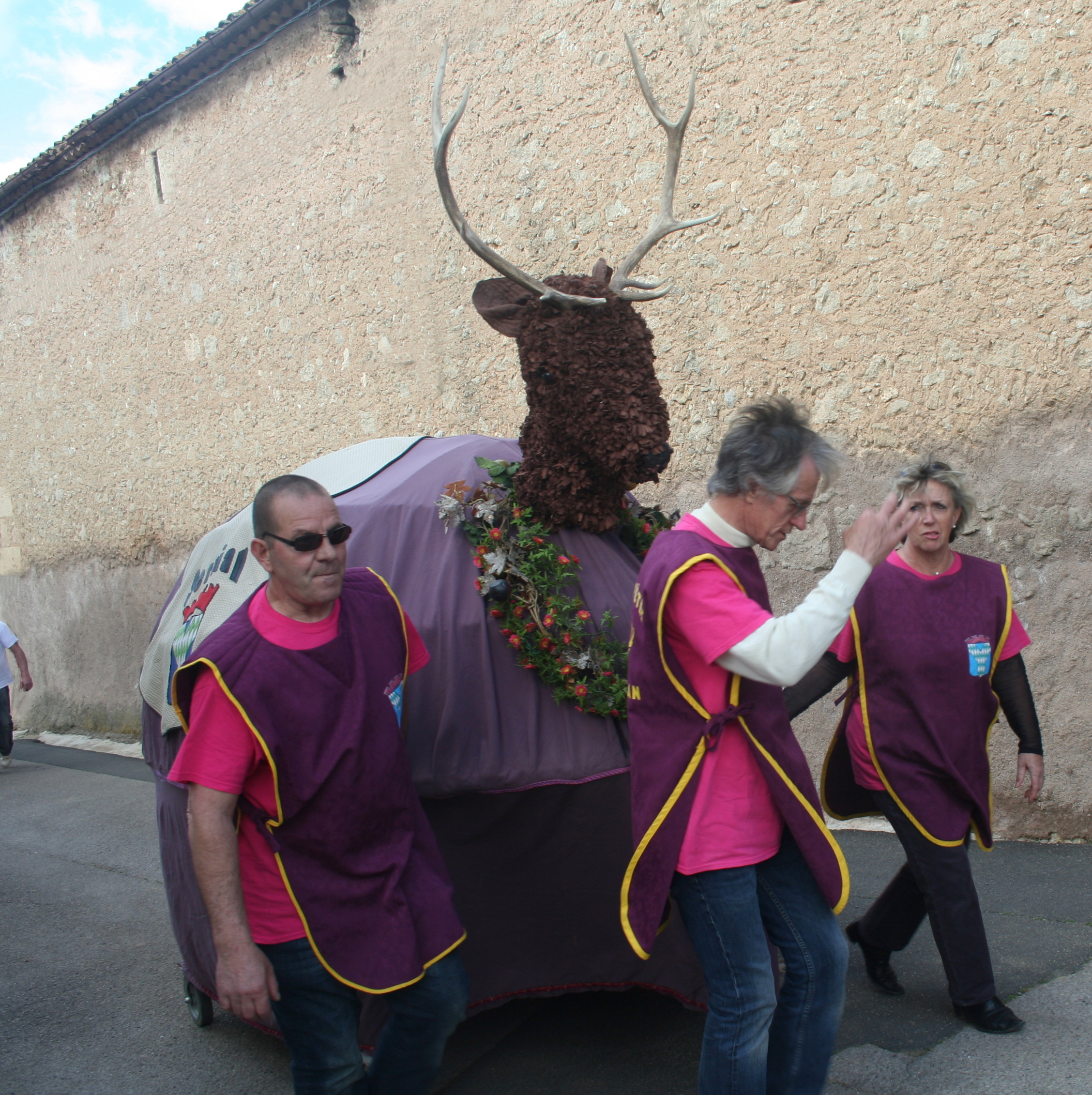 Servian (Hérault) - animal totémique : le cerf, de sortie à Castelnau-de-Guers